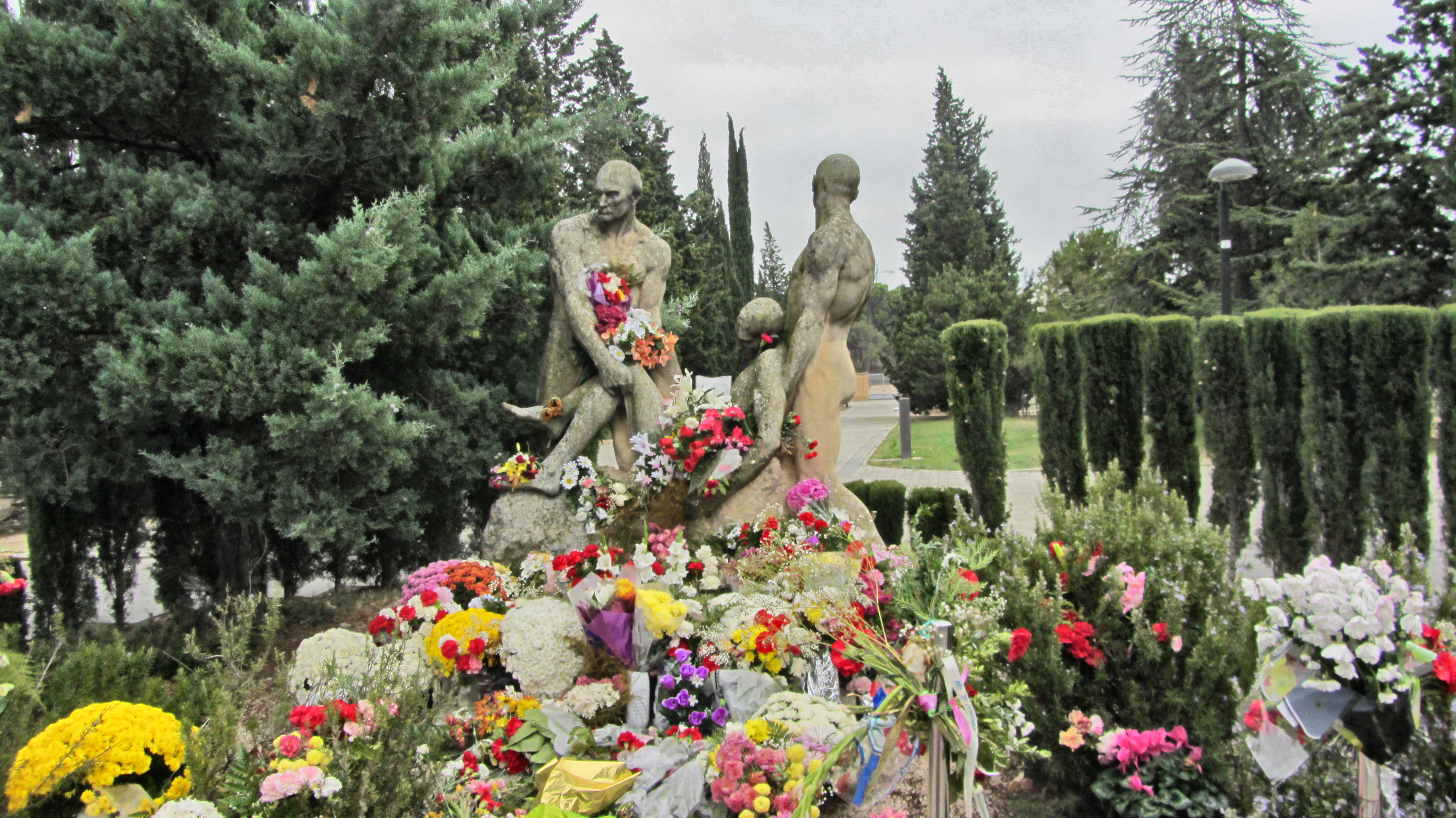 Monumento a la Fosa Común, Cementerio de Torrero, Zaragoza con las ofrendas florales del pasado día 1-11-2015, Día de Difuntos